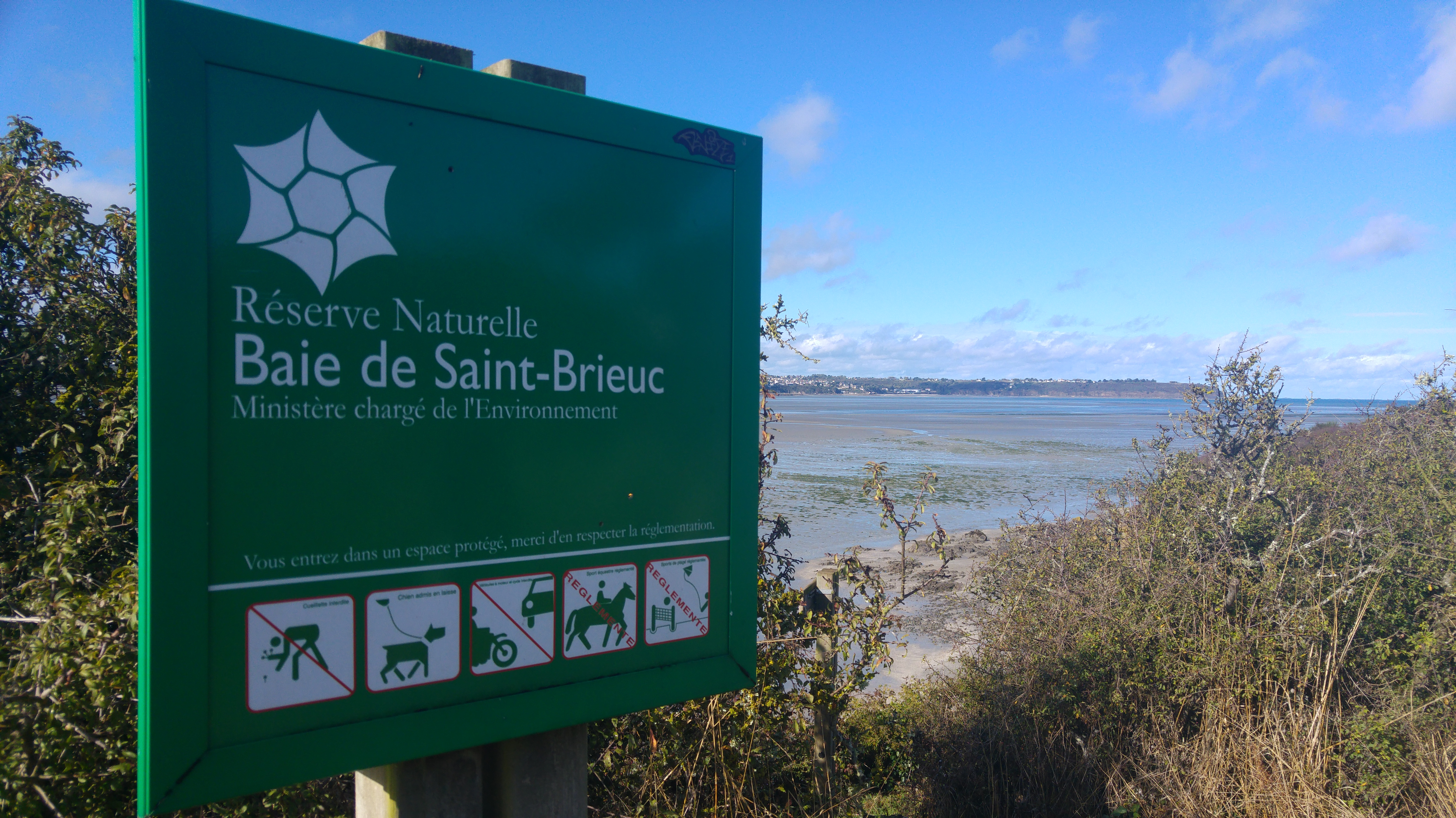 Panneau d'entrée de la réserve naturelle et vue sur la baie de Saint-Brieuc, en venant de la maison de la baie